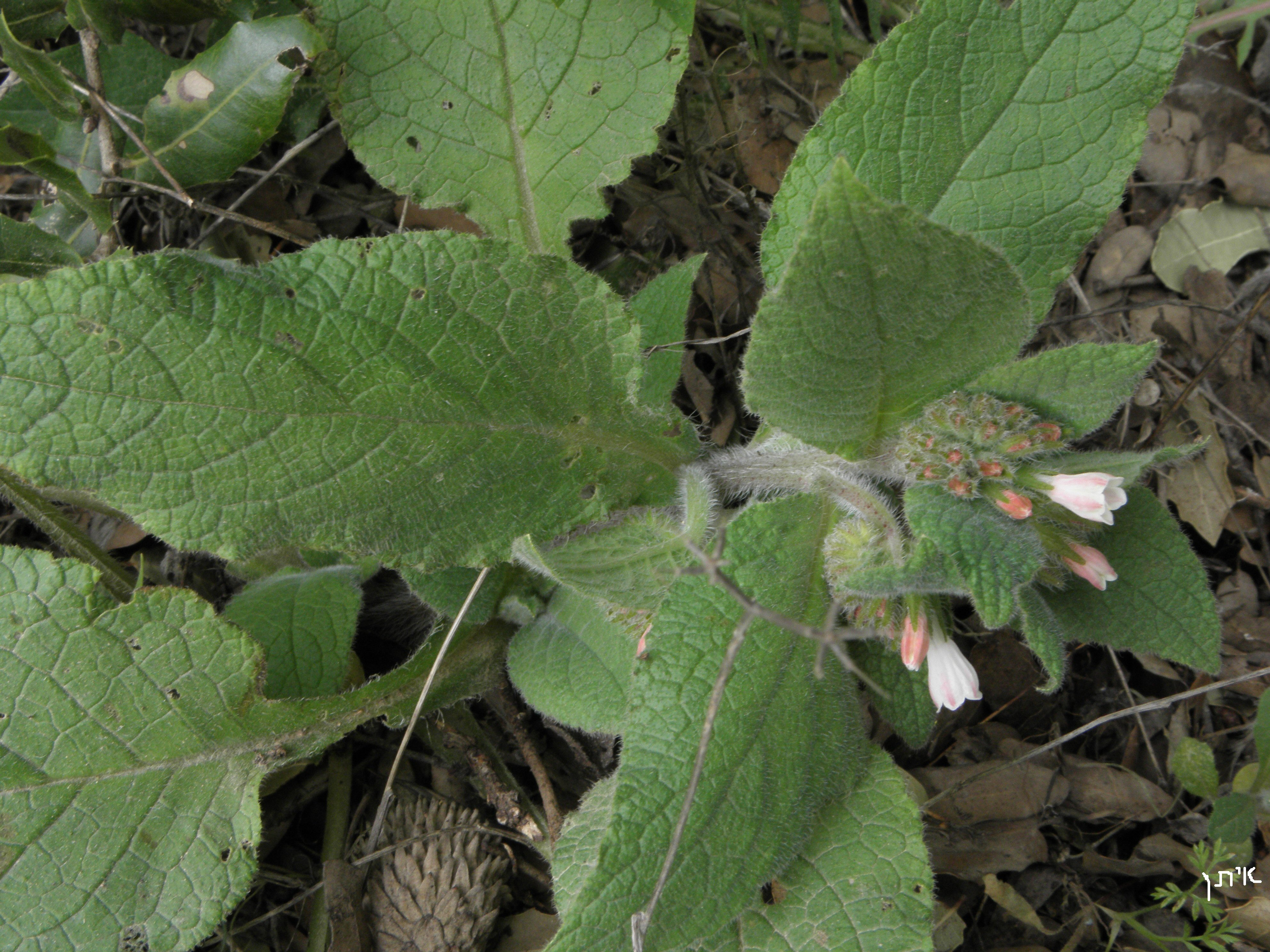 Symphytum brachycalyx ( Comfrey) סינפיטון ארצישראלי, הר הלל